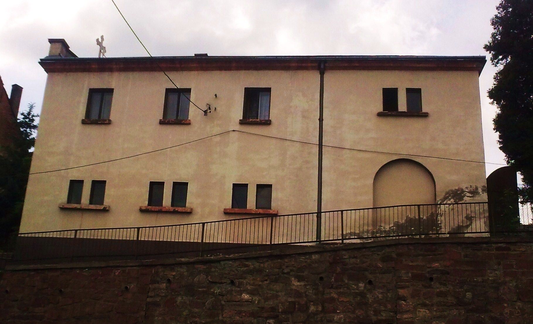 Nowa Ruda, ul. Cmentarna - cmentarz komunalny (budynek bramny)